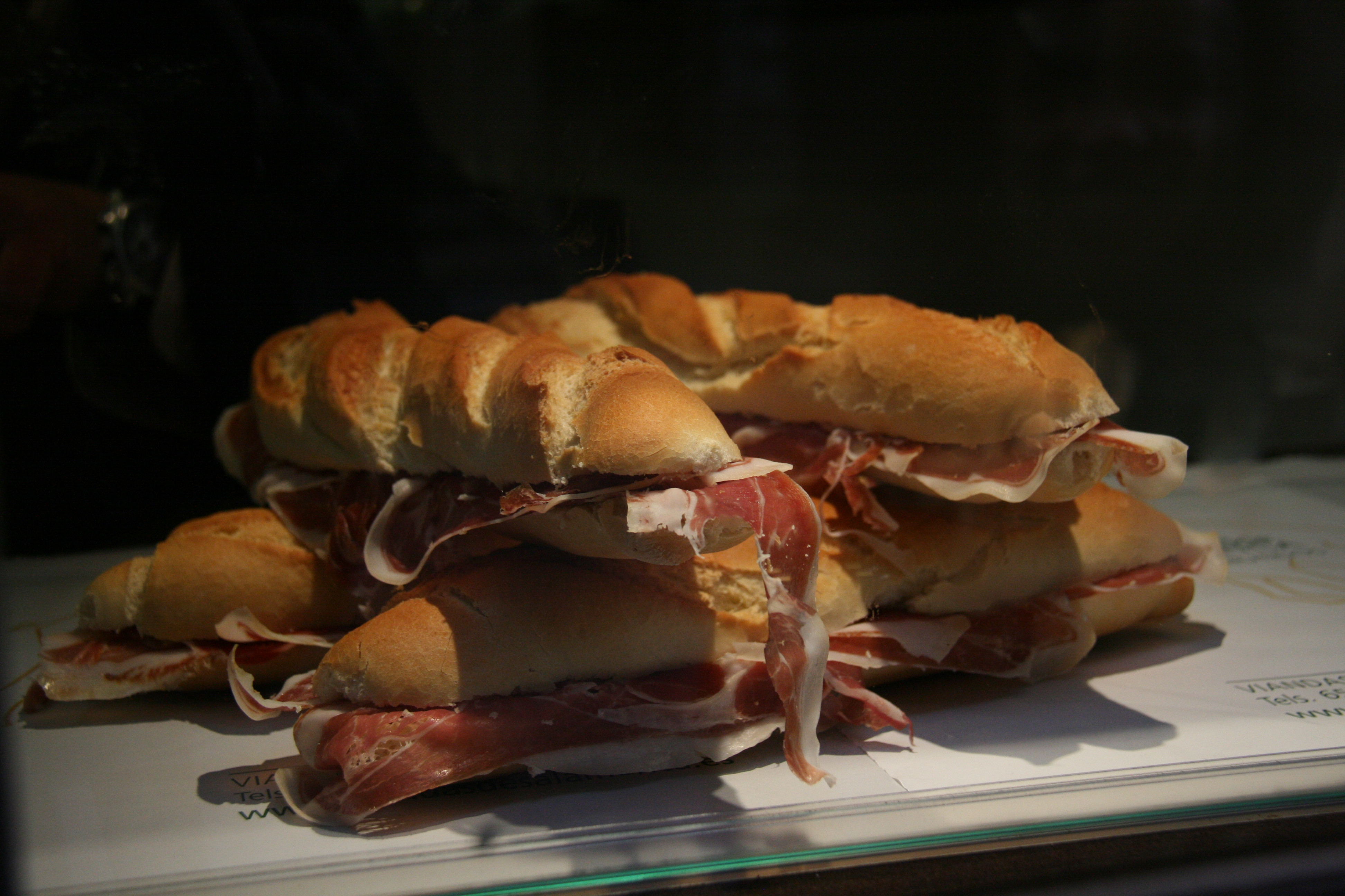 Bocadillo de jamón (Salamanca). Apilamiento